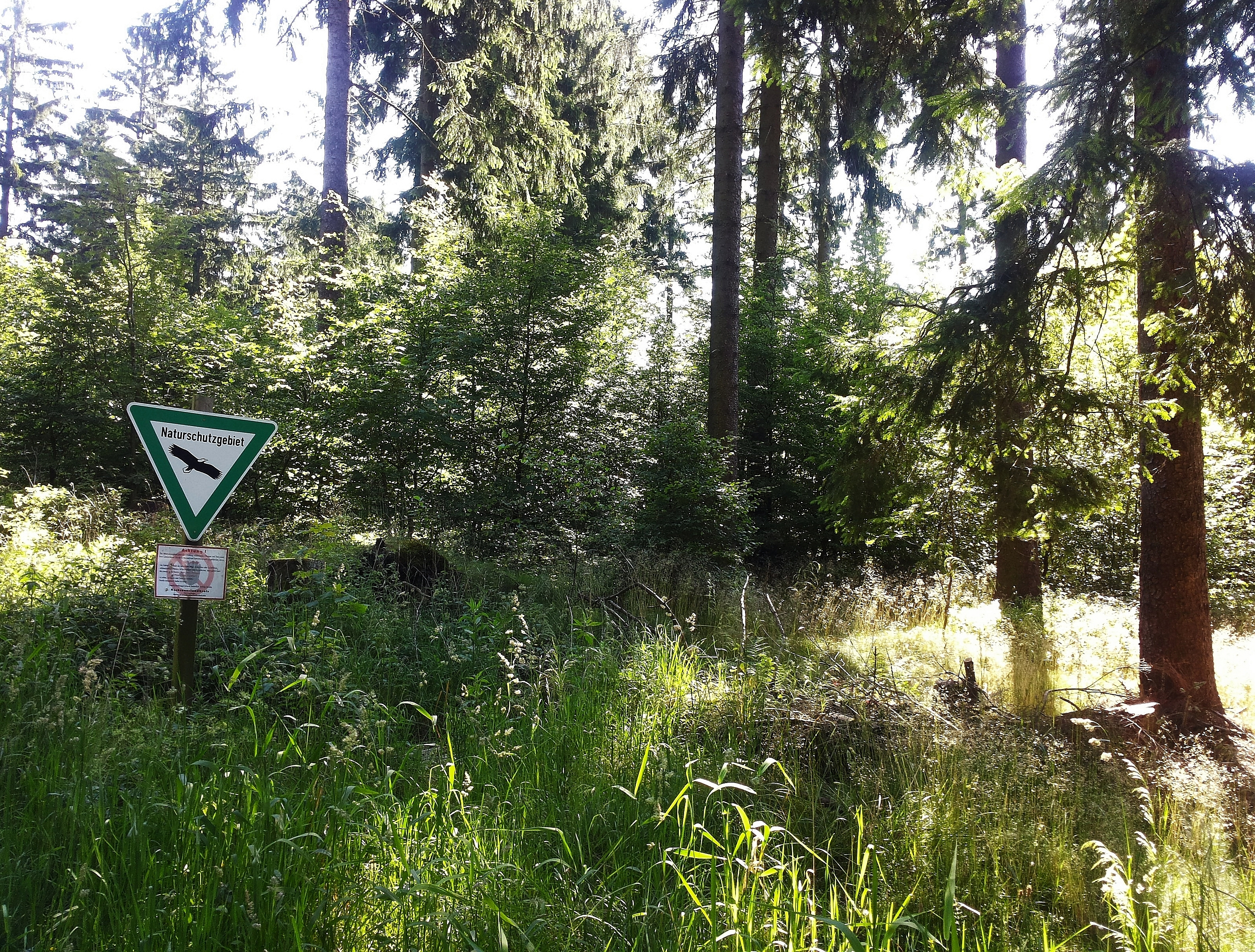 Naturschutzgebiet Hamorsbruch, Hinweisschild nahe Fernmeldeturm Meschede (Germany)